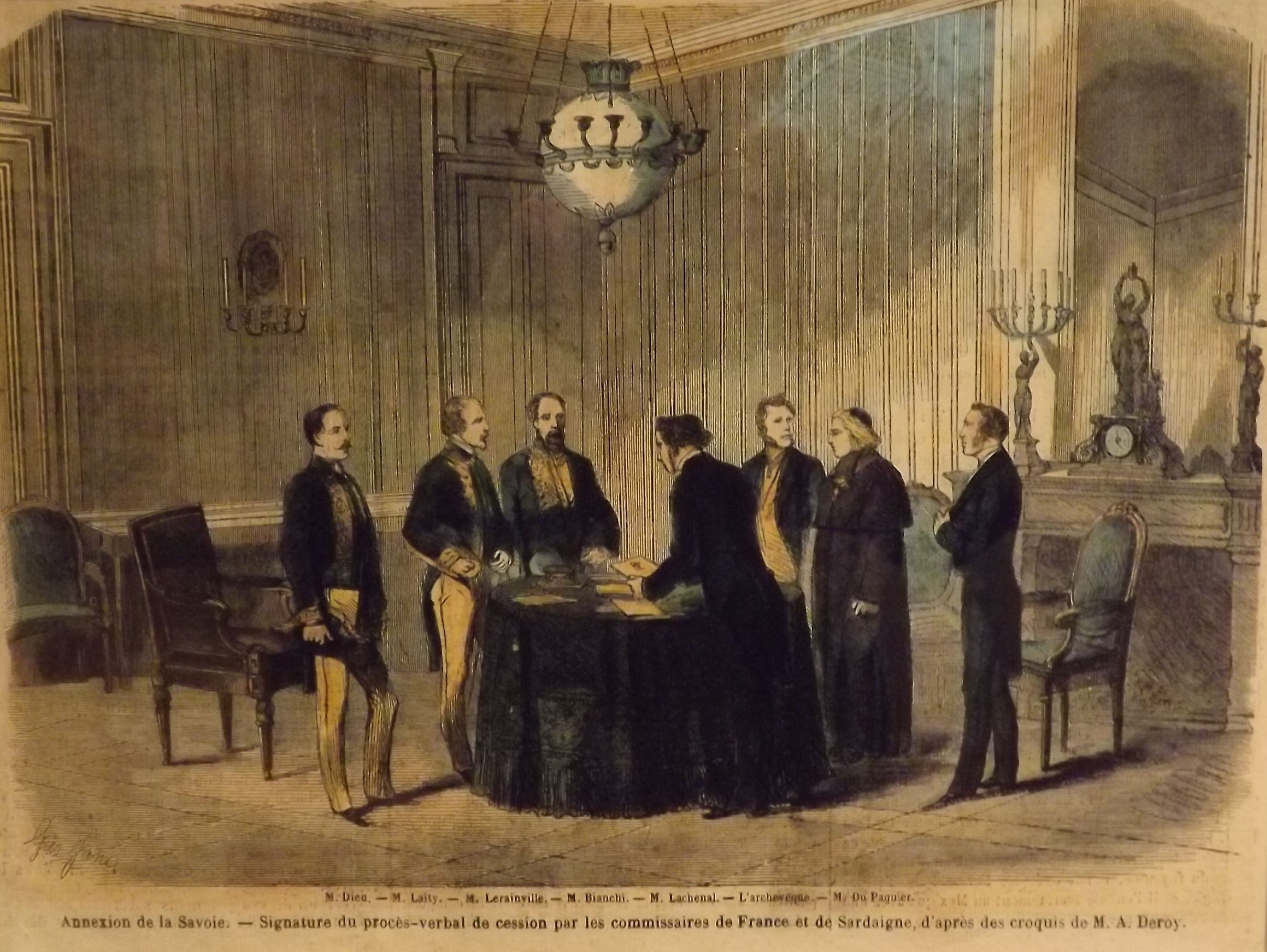 M. Dieu (préfet), M. Laity (sénateur), M. Levainville (préfet), M. Bianchi (commissaire extraordinaire), M. Lachenal, Mgr Billiet (archevêque), M. Dupasquier in Château des ducs de Savoie, Chambéry.